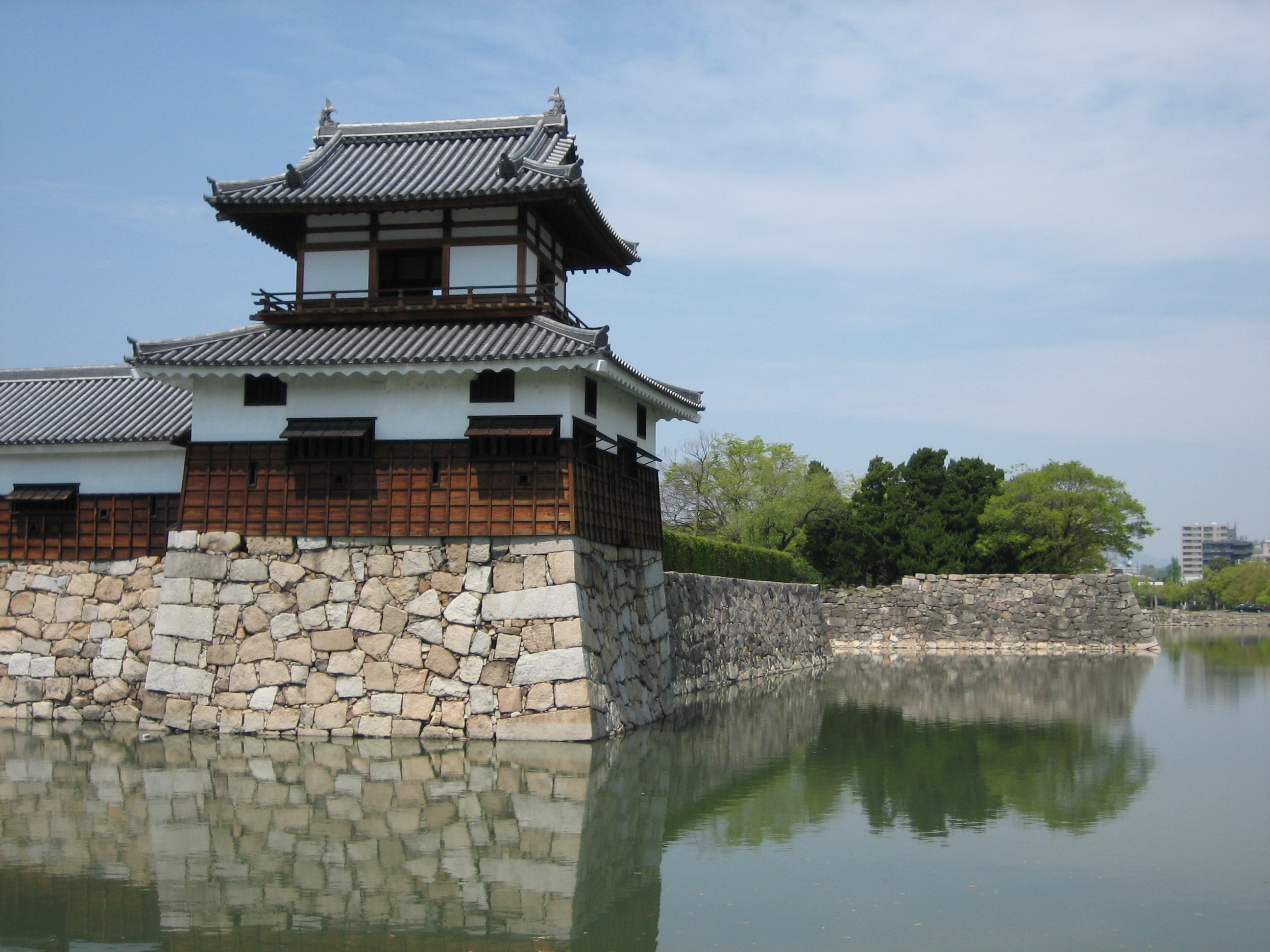 Taiko-yagura and Hon-maru